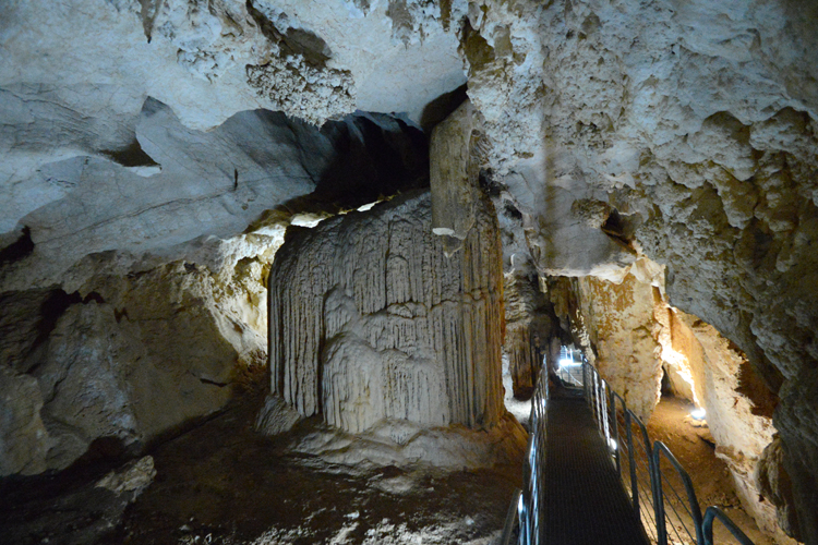 Grotta Corbeddu, Oliena-Nuoro